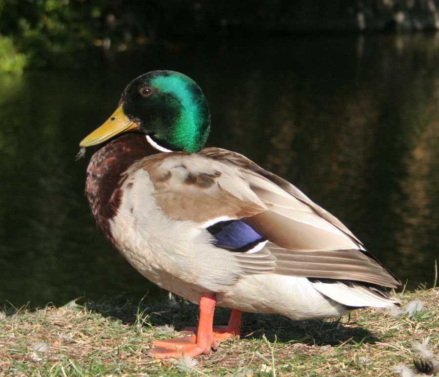 Anas platyrhynchos